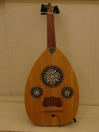 Arab oud (originally built in Cairo, with pickup system mounted), front view.